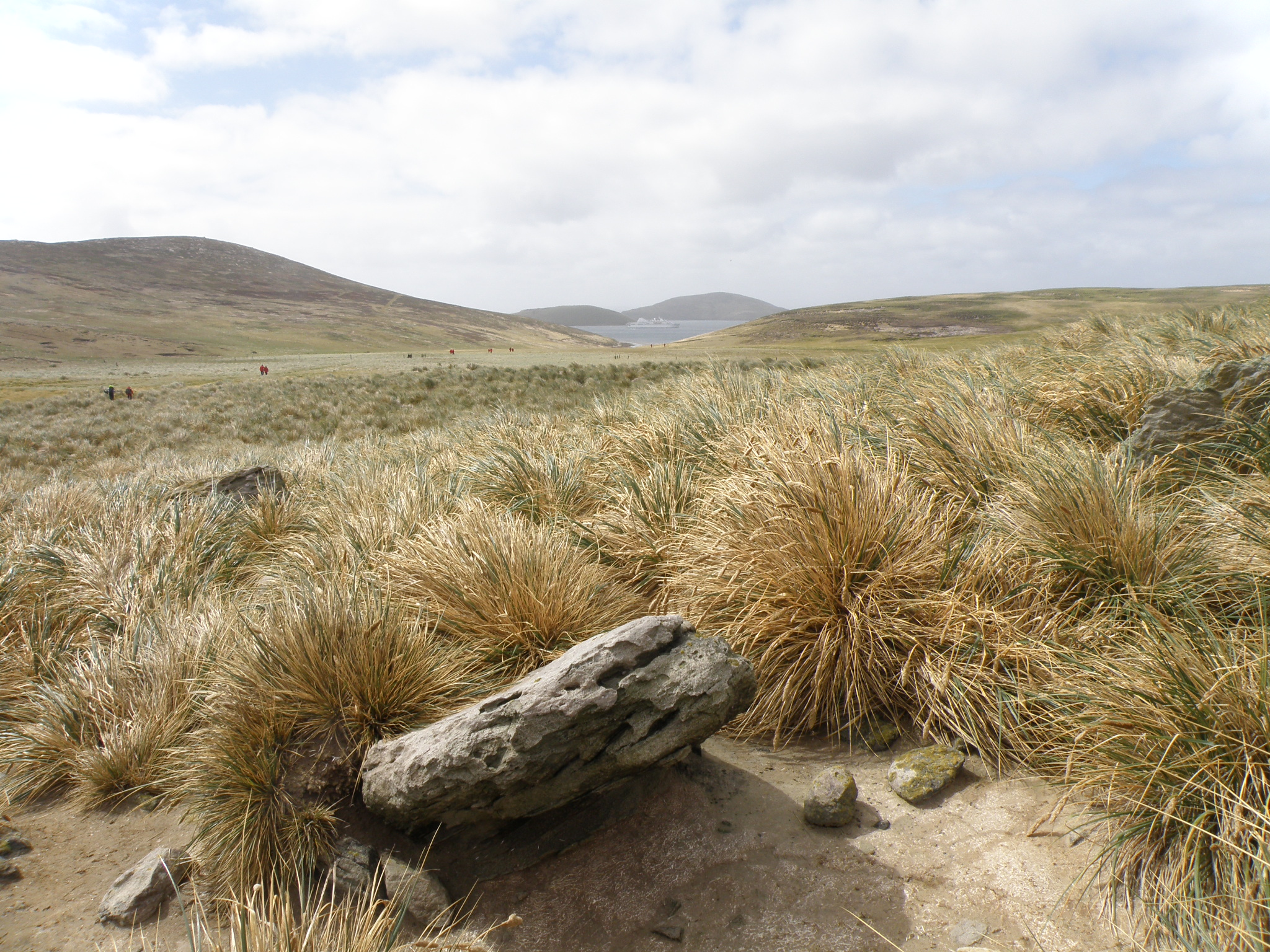 Îles Malouines - New Island - Paysage de tussack